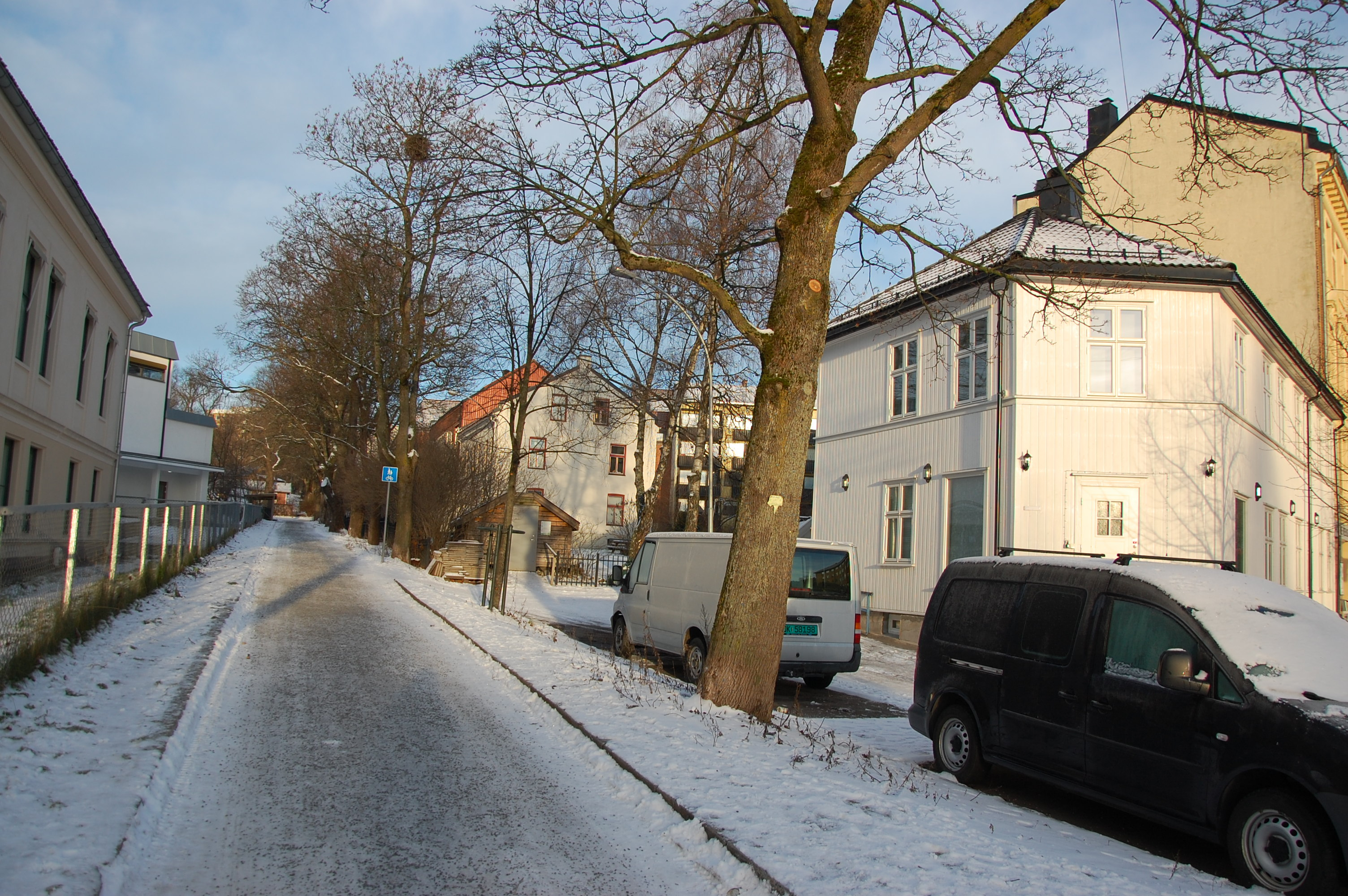 Bjølsengata på Bjølsen i Oslo sett fra Advokat Dehlis plass. Til høyre Bjølsengata 1, nummer 3 litt lenger oppe på samme side. Bjølsen skole ligger til venstre.